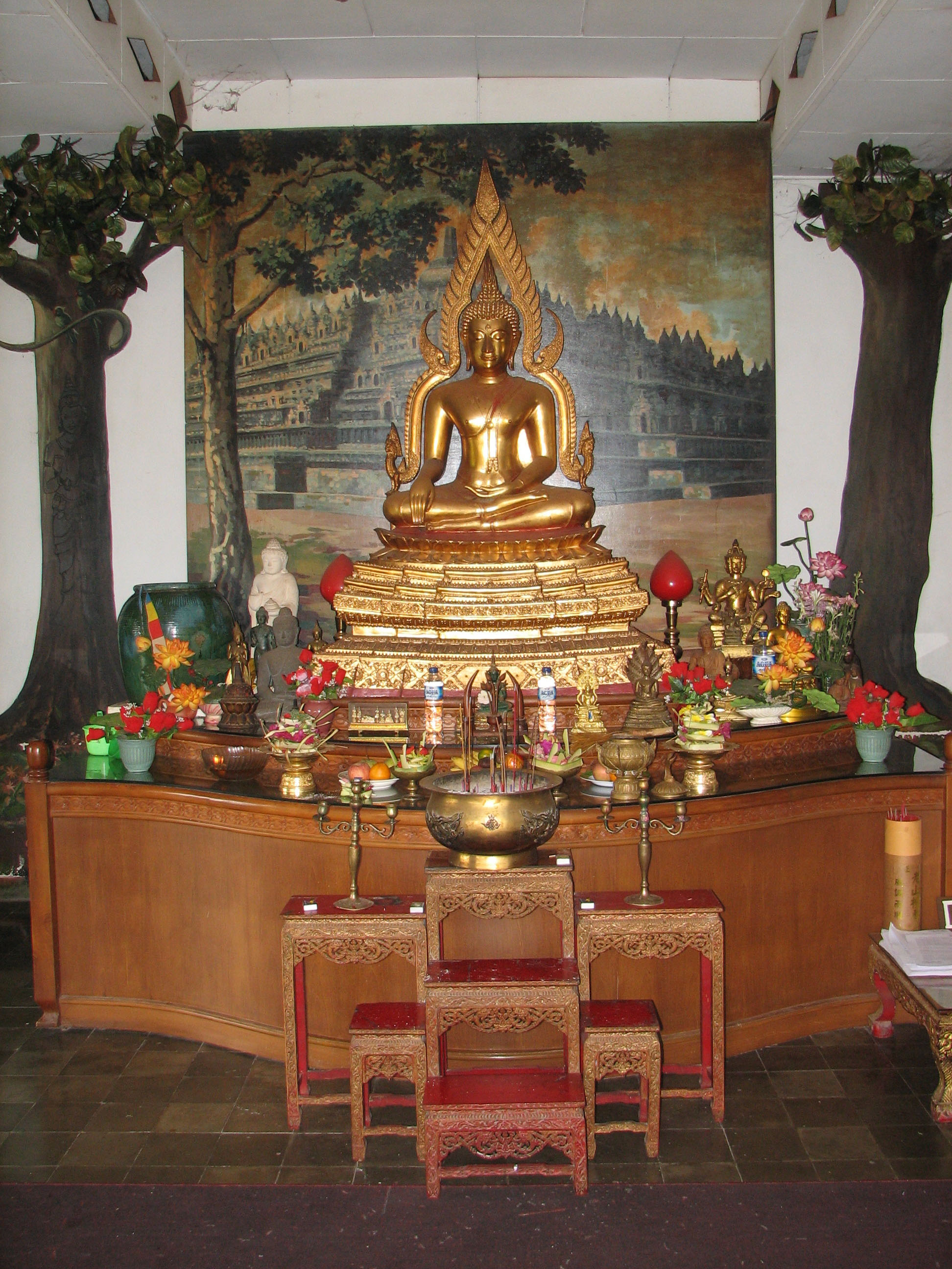 Bouddha doré au temple de Brahma Vihara Ashrama (Banjar)